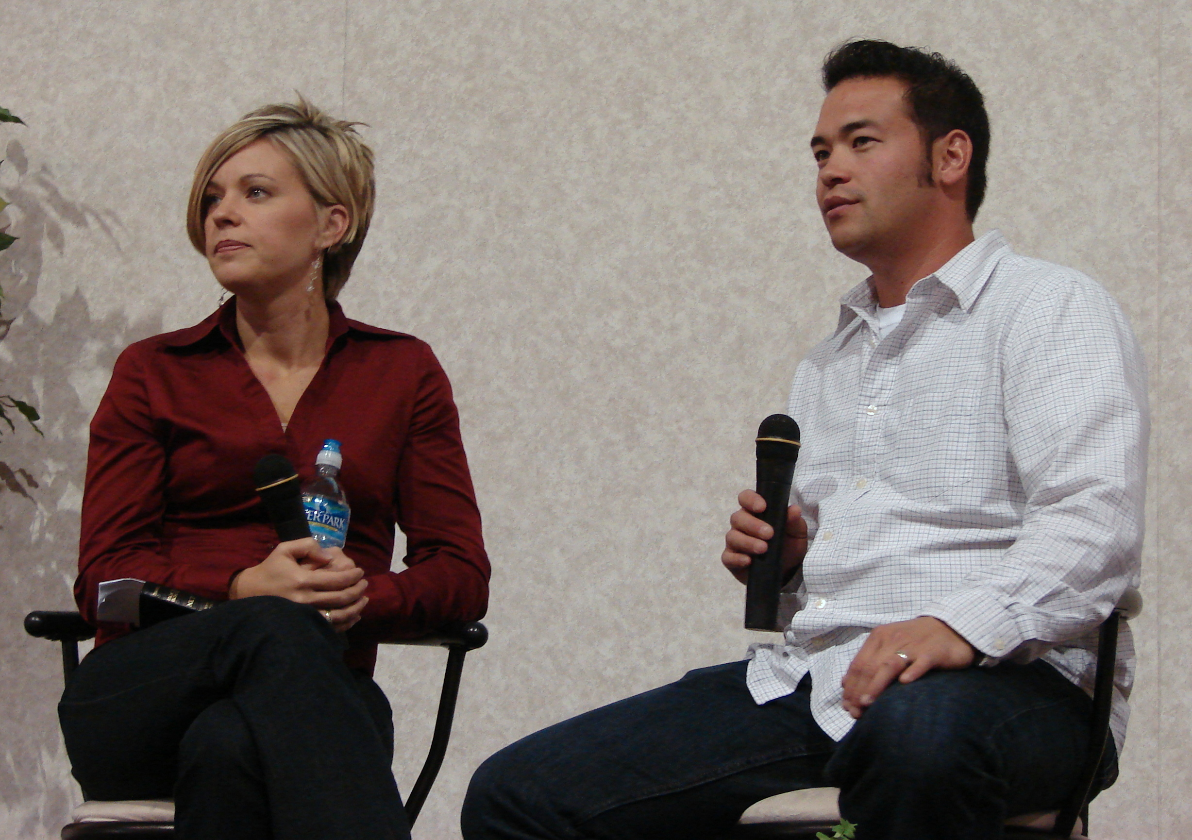 Jon and Kate Gosselin in 2008